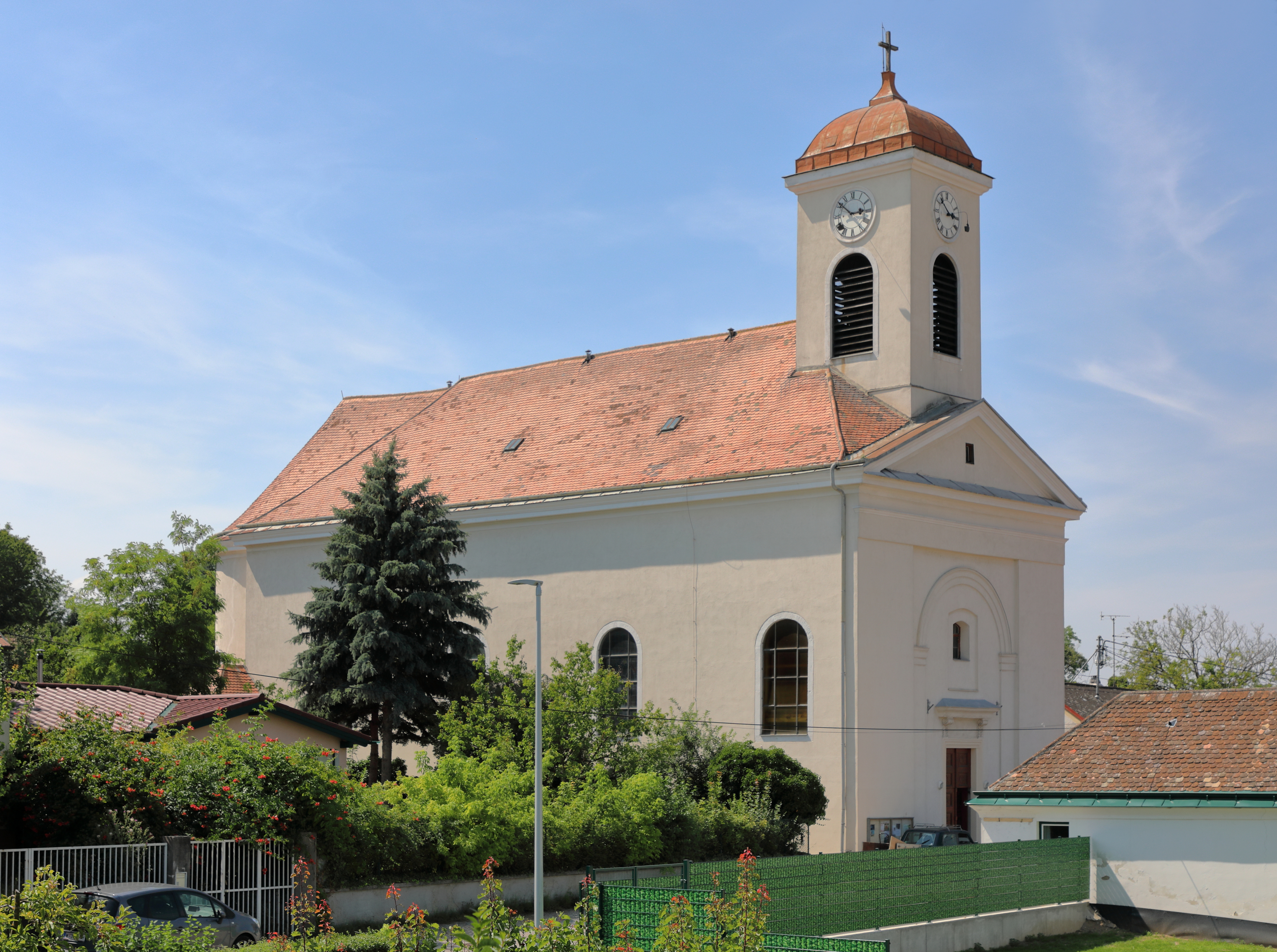 Südostansicht der röm.-kath. Pfarrkirche Maria Heimsuchung in Breitenwaida, ein Ortsteil der niederösterreichischen Stadtgemeinde Hollabrunn. Die nach Westen ausgerichtete klassizistische Saalkirche wurde 1822/23 vom Josef Reiminger errichtet.